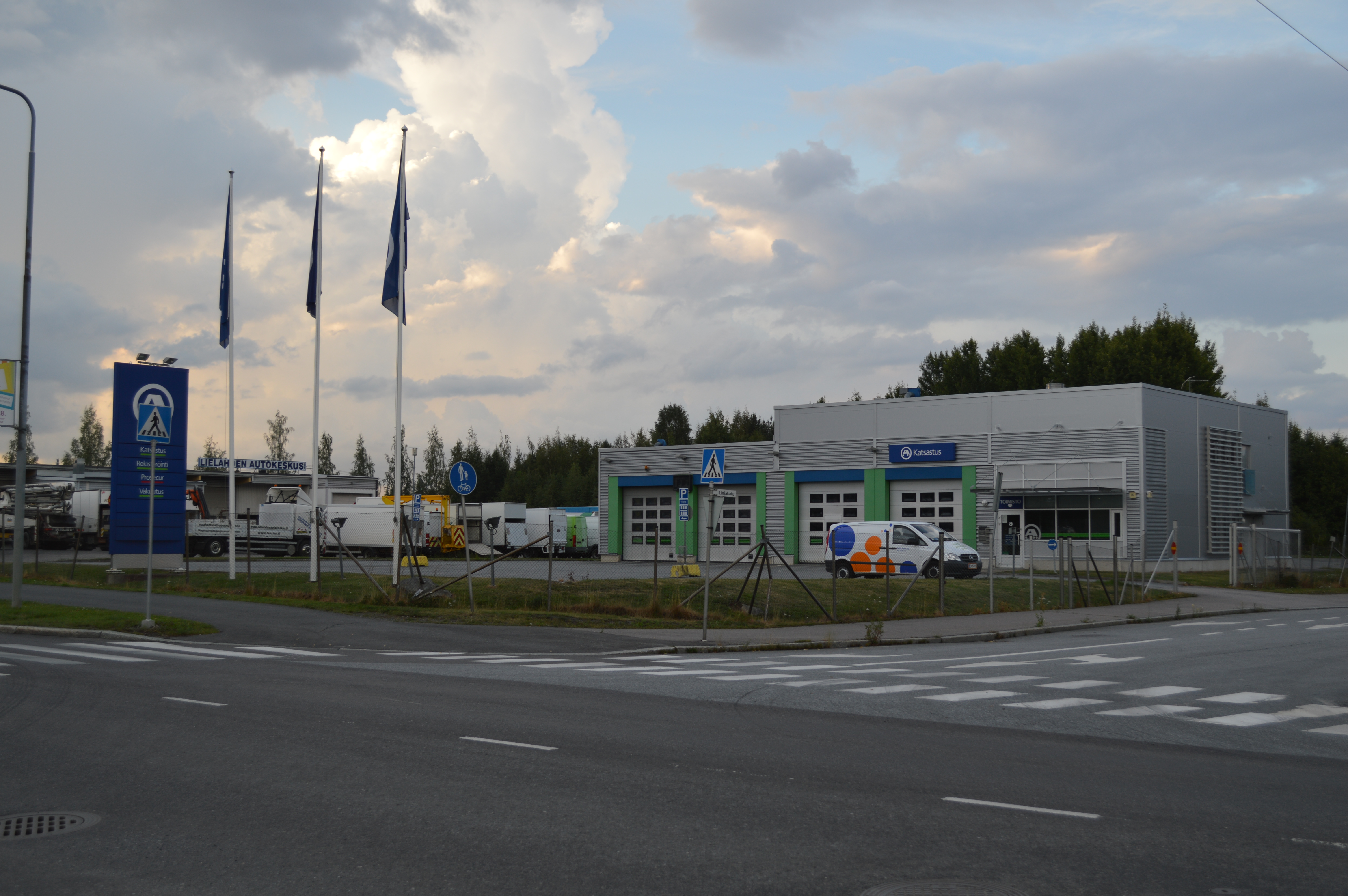 A-katsastuksen toimipiste Lielahdessa Tampereella